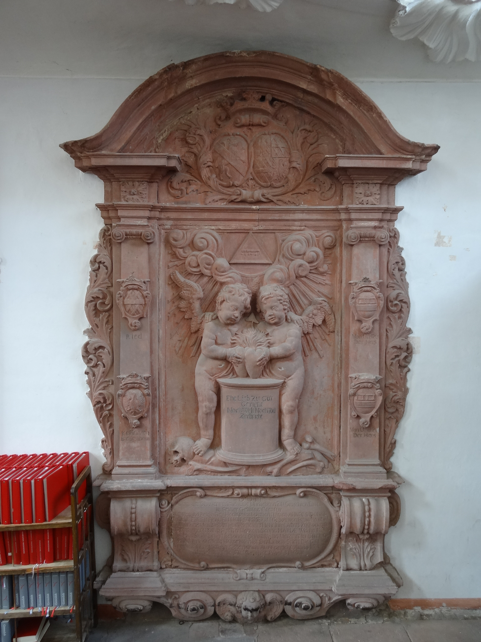 Barockes Grabmal der Freifrau Anna Sidonia von Sommer (gestorben 1713), Klosterkirche (JVA Rockenberg)